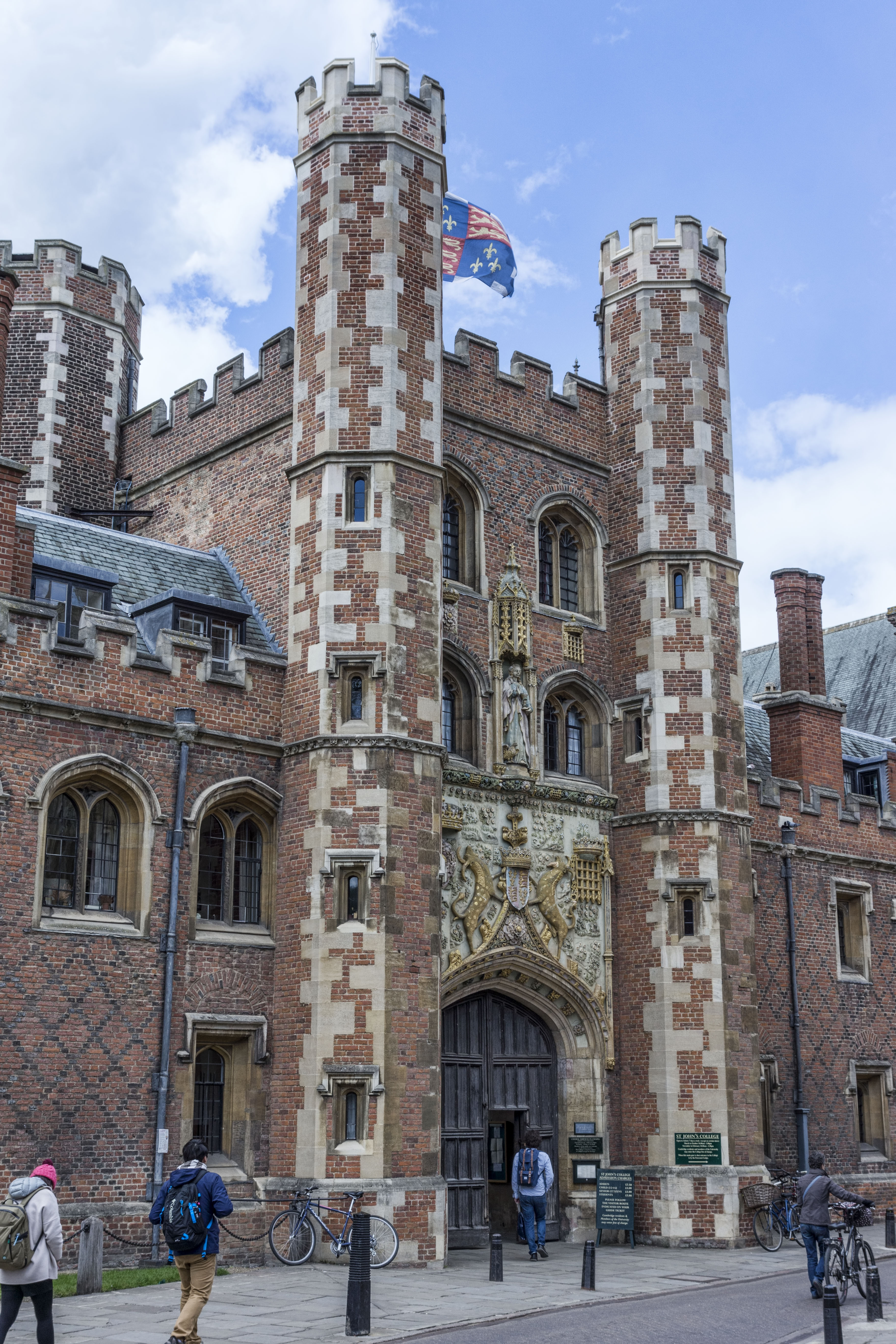 Porte du St John's College à Cambridge